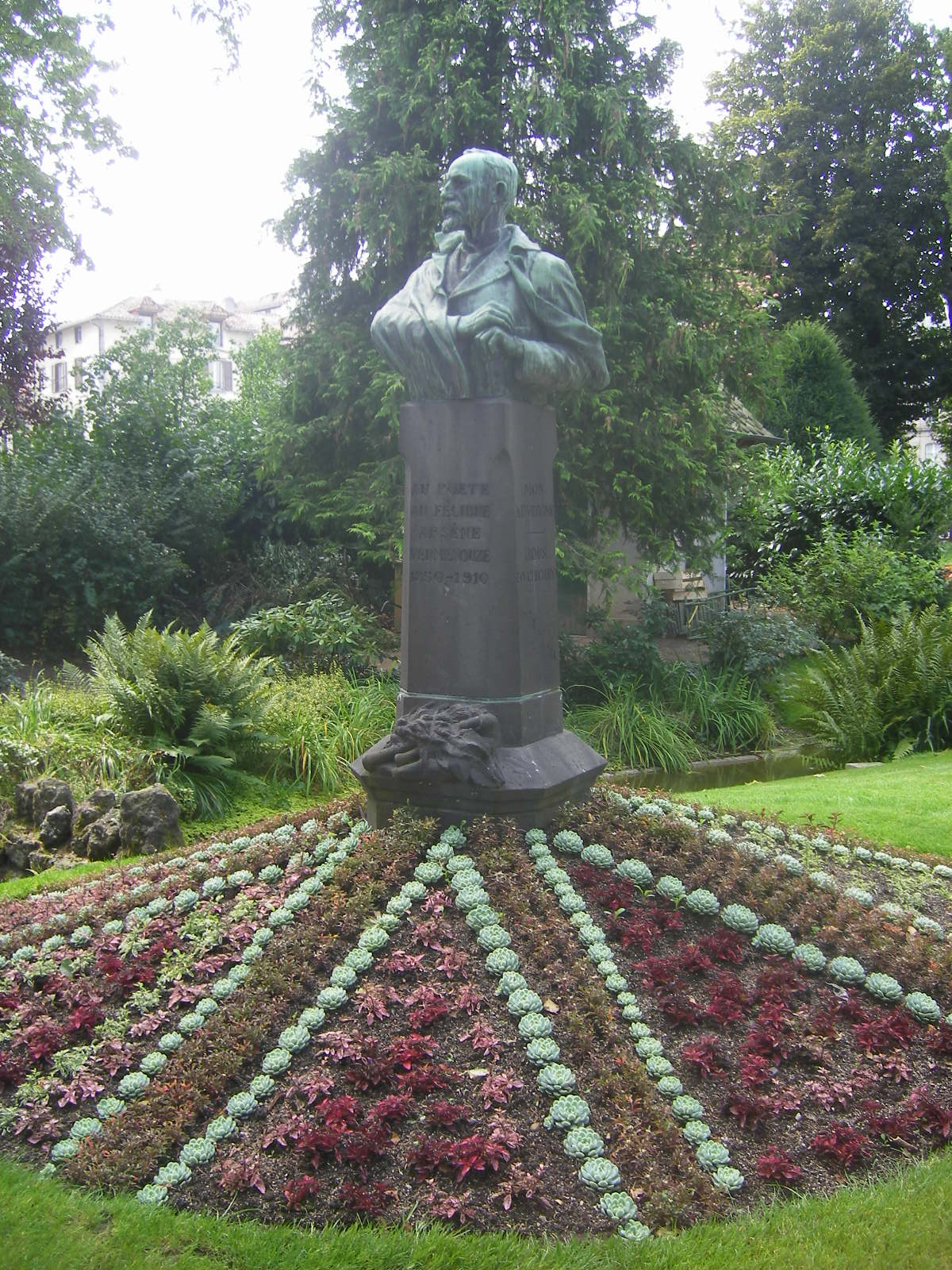 Aurillac